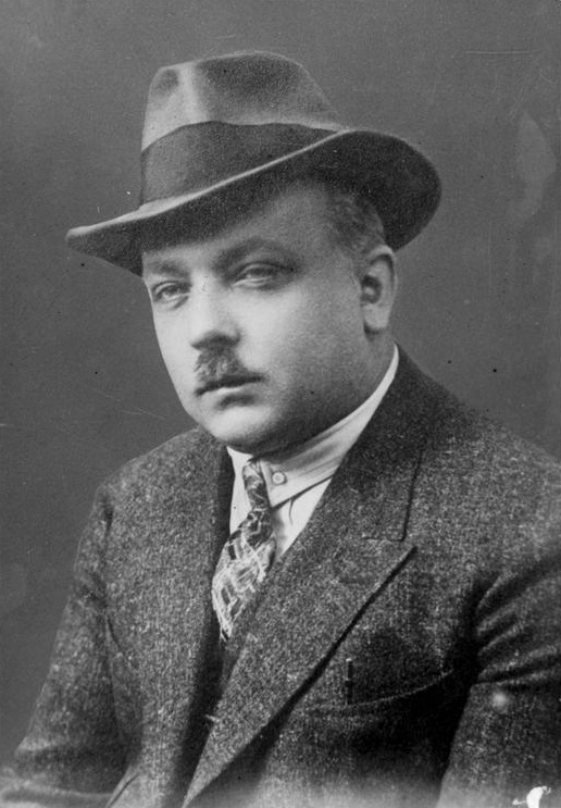 Kazimierz Czapiński, poseł PPS 1919 - 1935